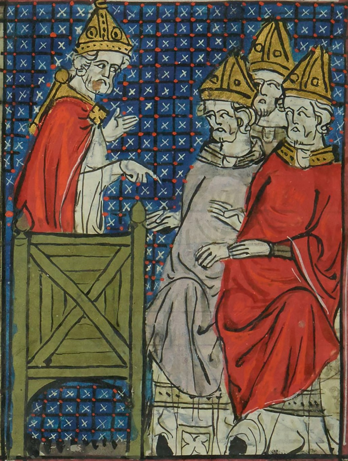 Urban II. na clermontské synodě